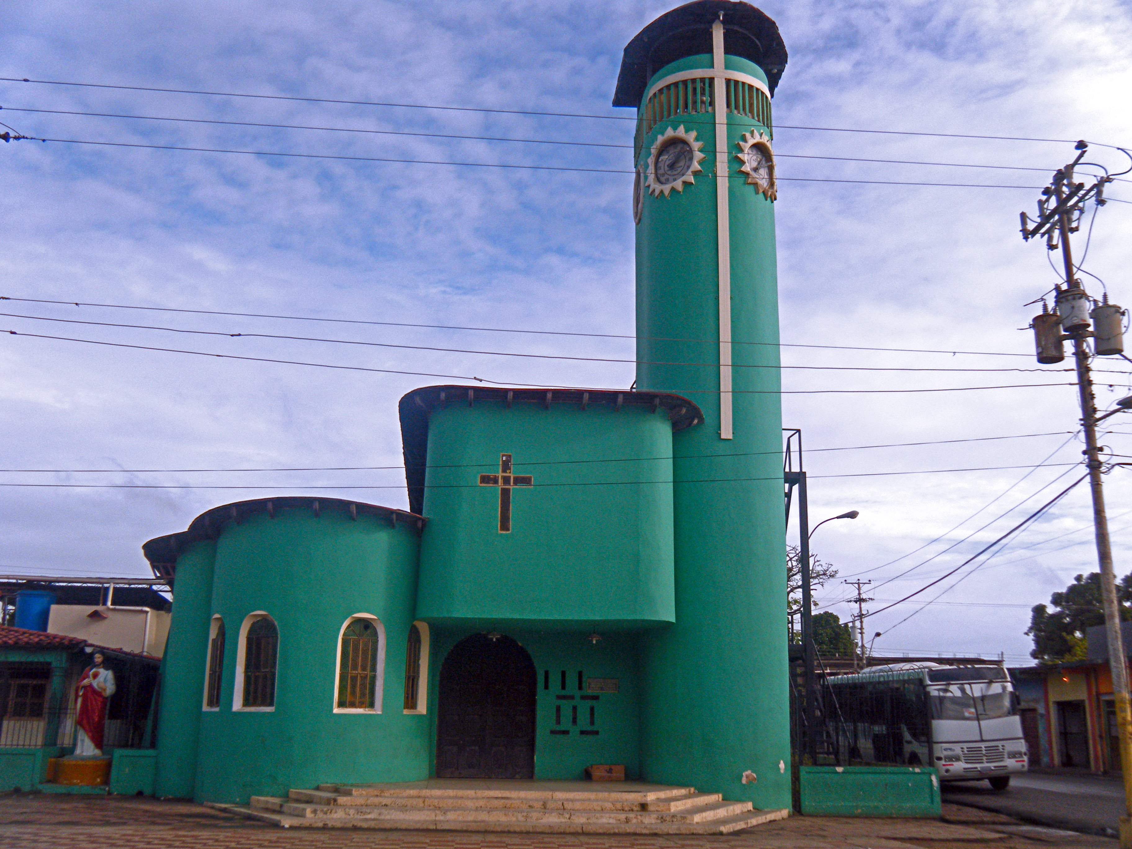 Iglesia San Jose en Temblador, Estado Monagas Venezuela.